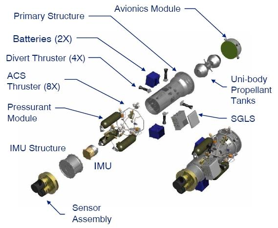 XSS-10 schematics